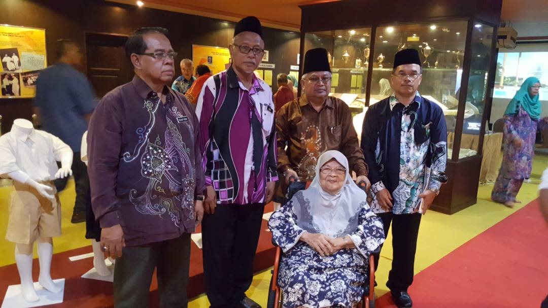 Merupakan antara guru wanita yang terawal mengajar di SK Sebatu